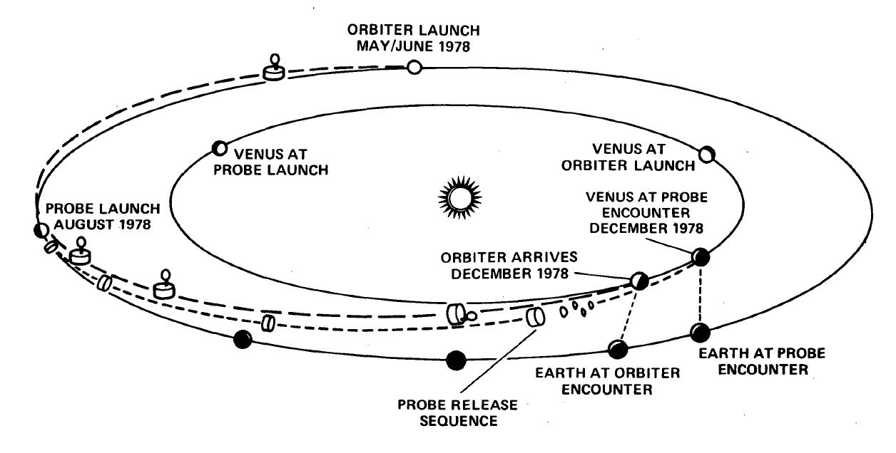 Pioneer-Venus-Trajectories